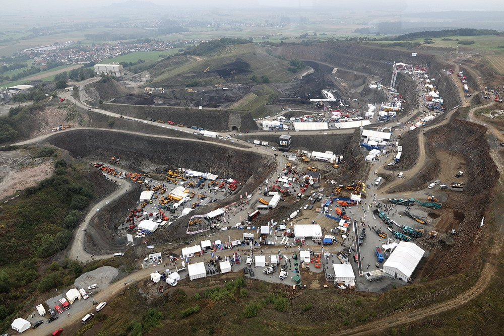 Steinexpo trade fair for construction materials industry